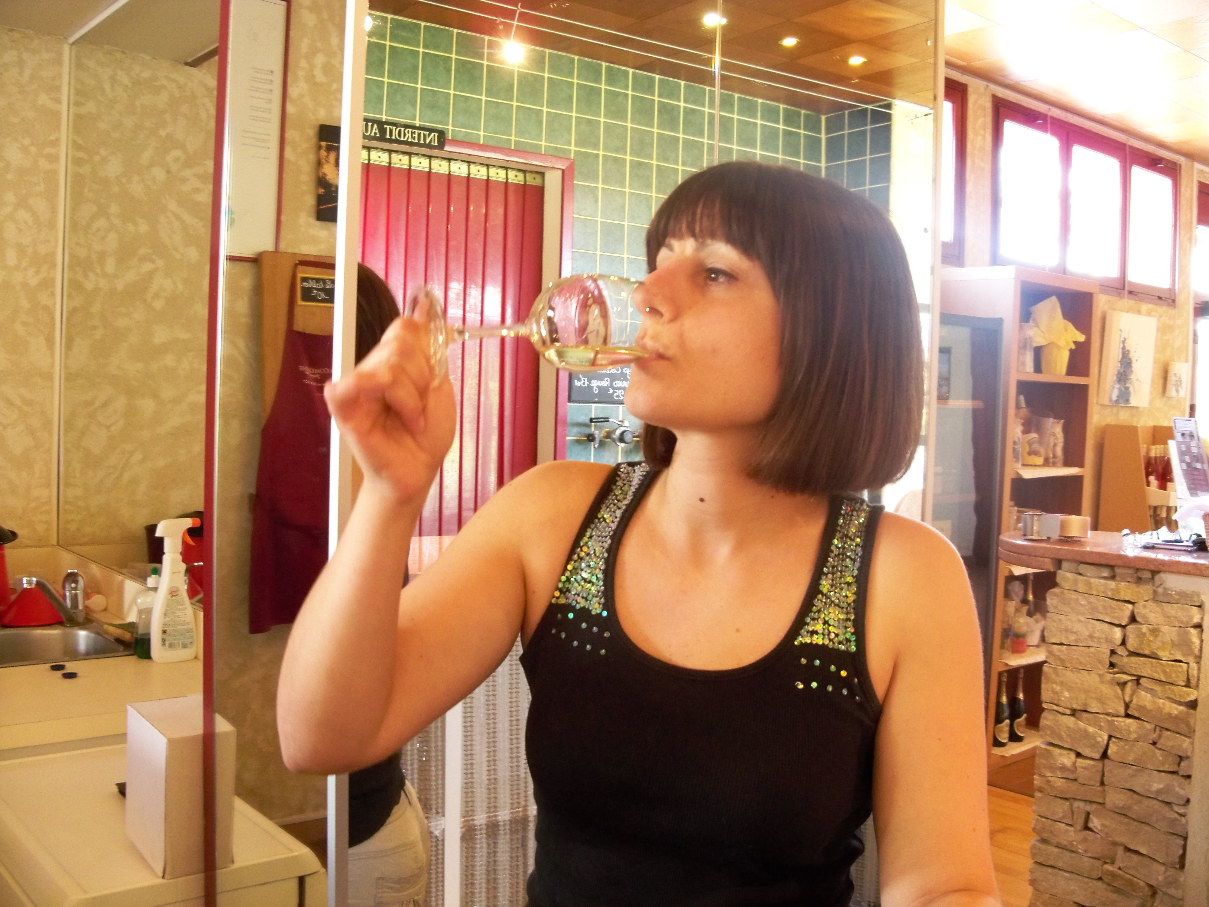 Dégustation au caveau, à Puyméras, Vaucluse